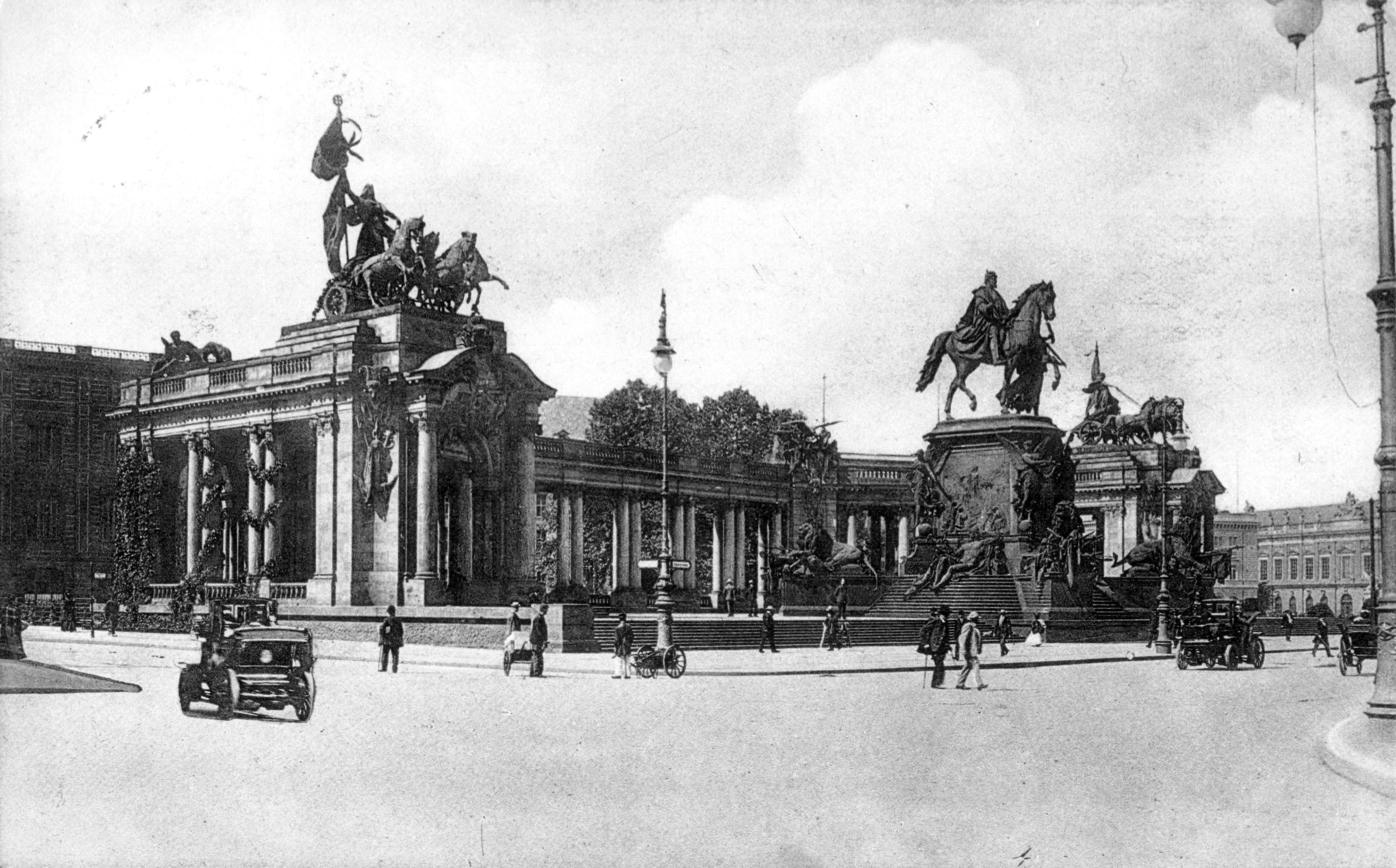 Berlin, Kaiser Wilhelm memorial